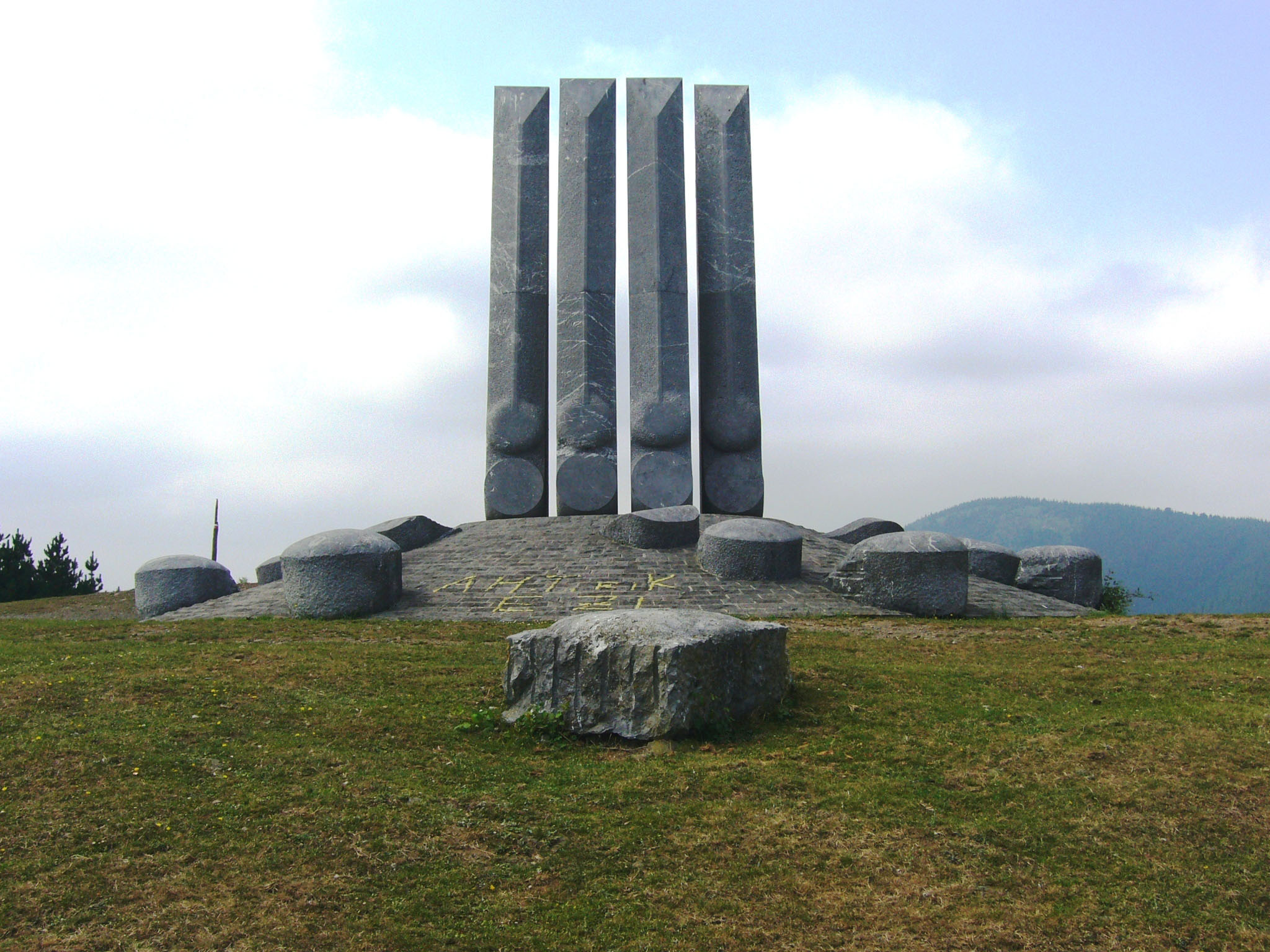 Mondragon（スペイン）、バスク山岳連名のためのモニュメント彫刻 「生命泉」（マルキーナ黒大理石）をベサイデ山に制作設置